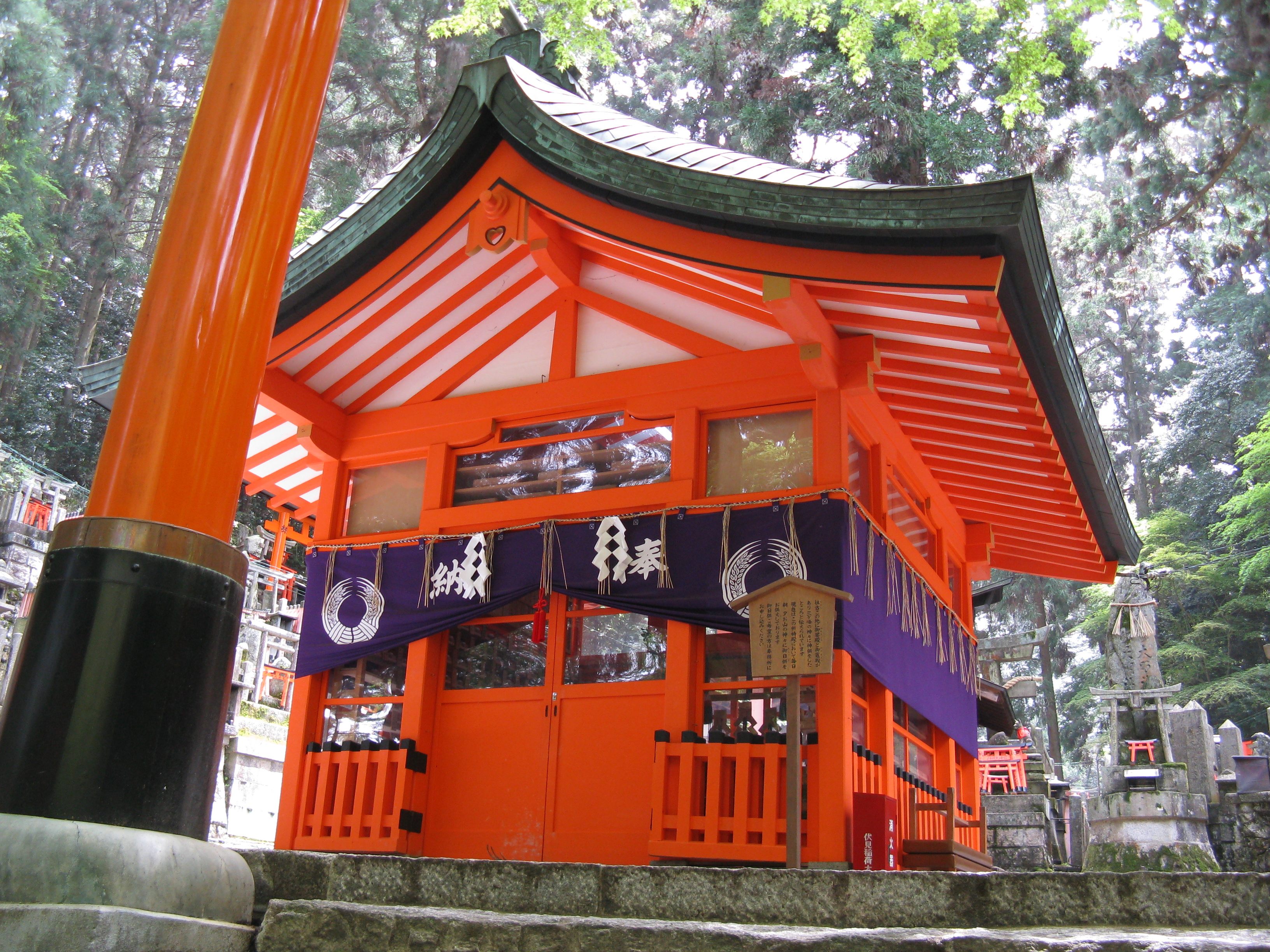 伏見稲荷大社 祈祷殿